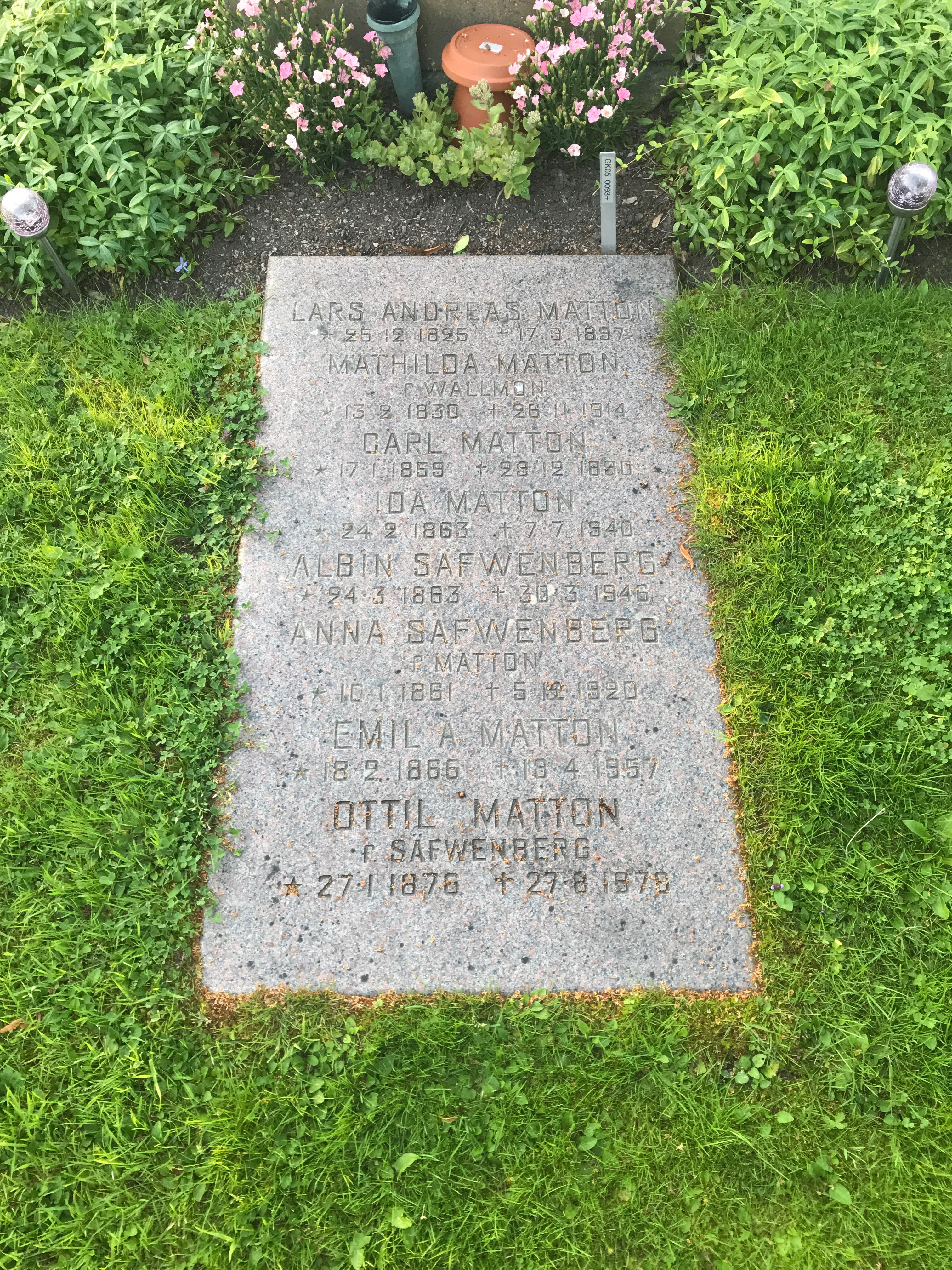 Gävle gamla kyrkogård